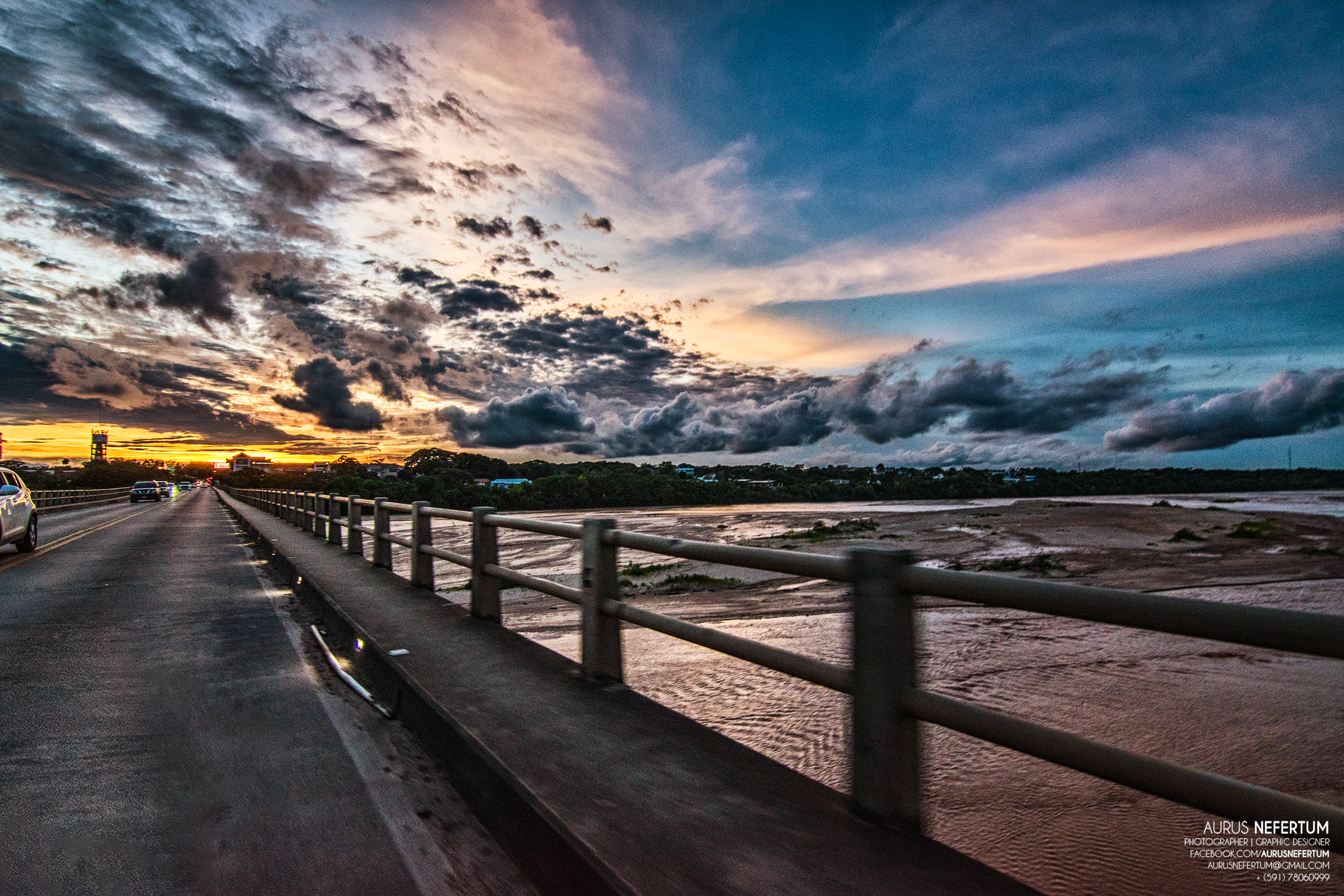 Fotografía tomada por el Artista Aurus Nefertum del puente Foianini, ubicado en la ciudad de Santa Cruz de la Sierra, Bolivia.